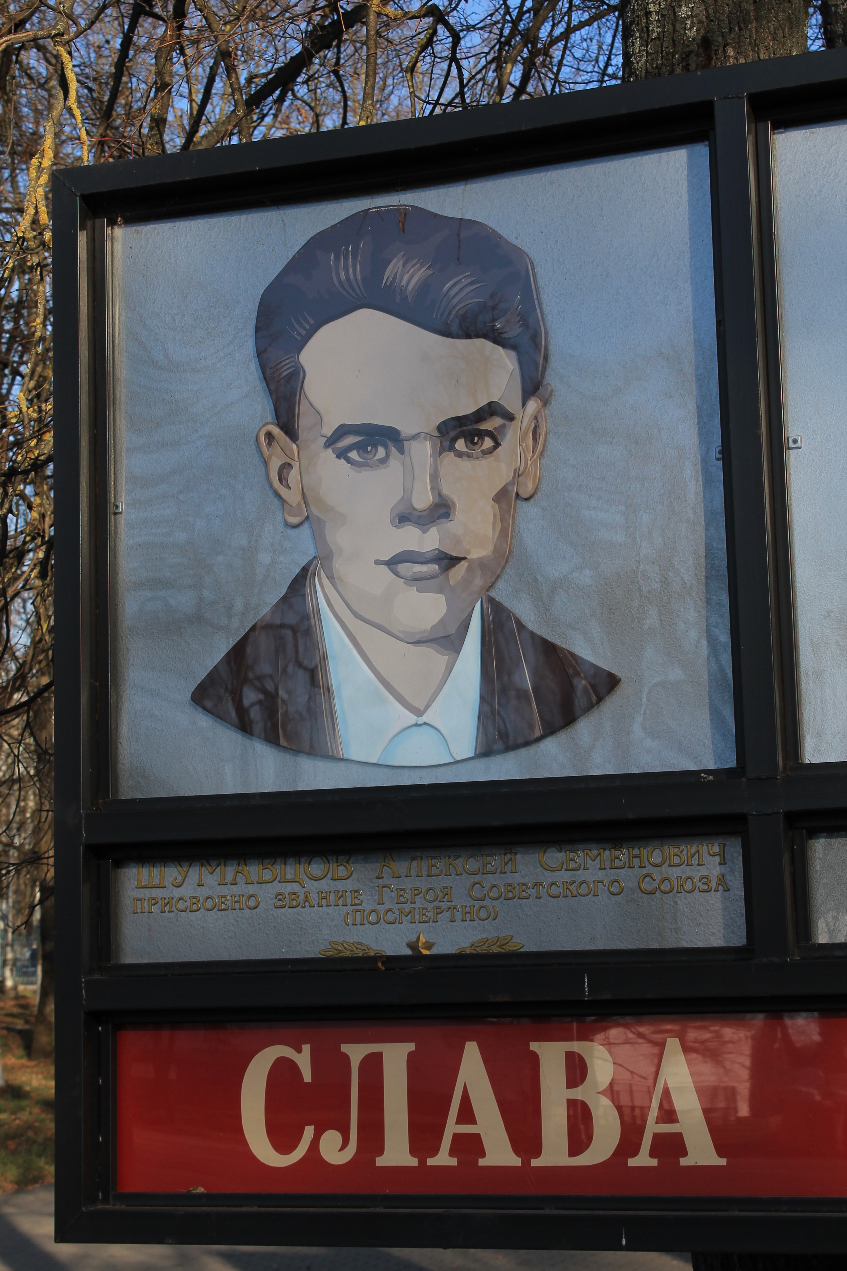 Памятник комсомольцам Людиновской комсомольской подпольной организации, погибшим в борьбе с немецко-фашистскими захватчиками в годы ВОВ (Калужская область, Людиново, Сквер, у центральной площади города)